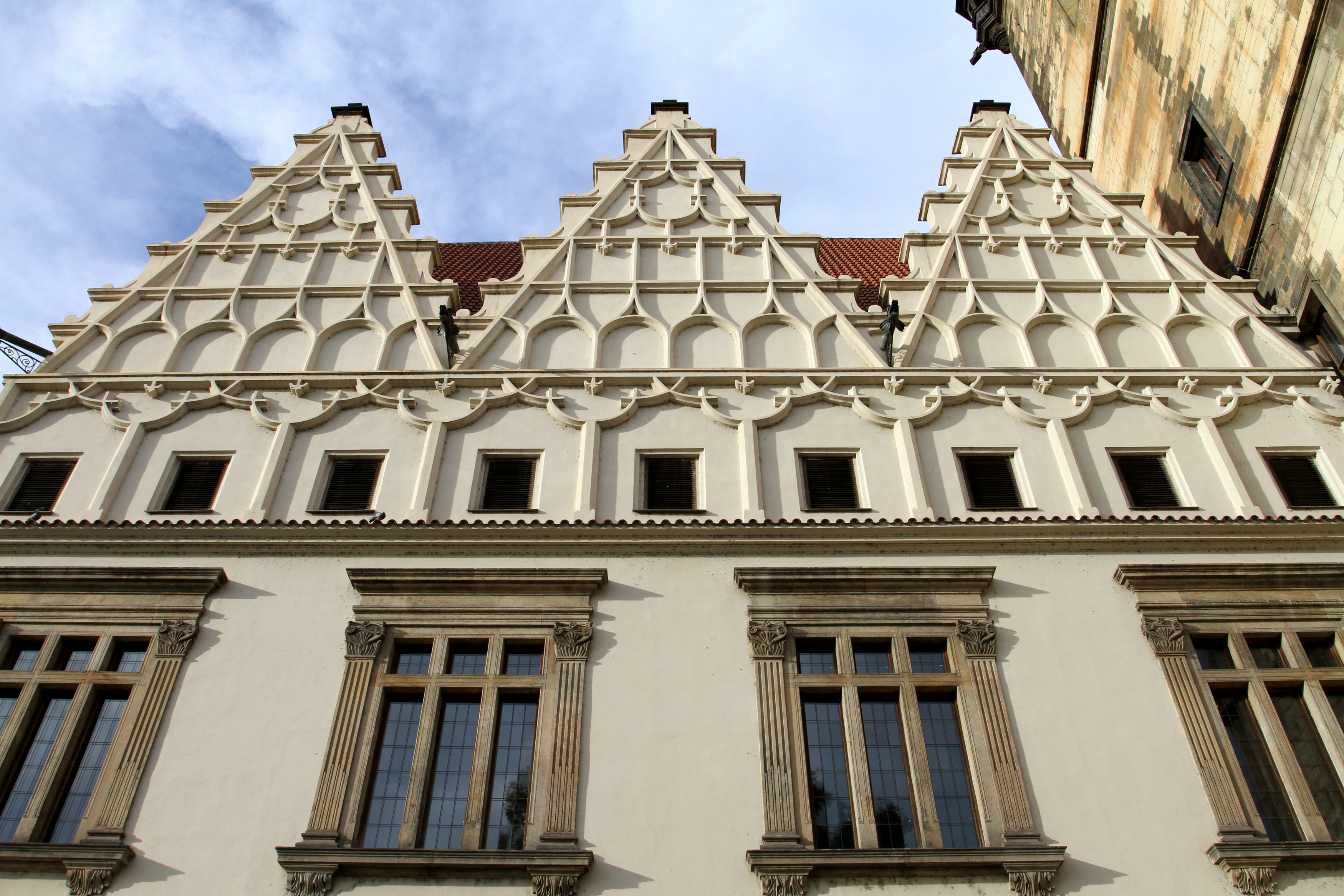 Radnice Novoměstská (Nové Město), Praha 2, Karlovo nám. 1/23, Nové Město